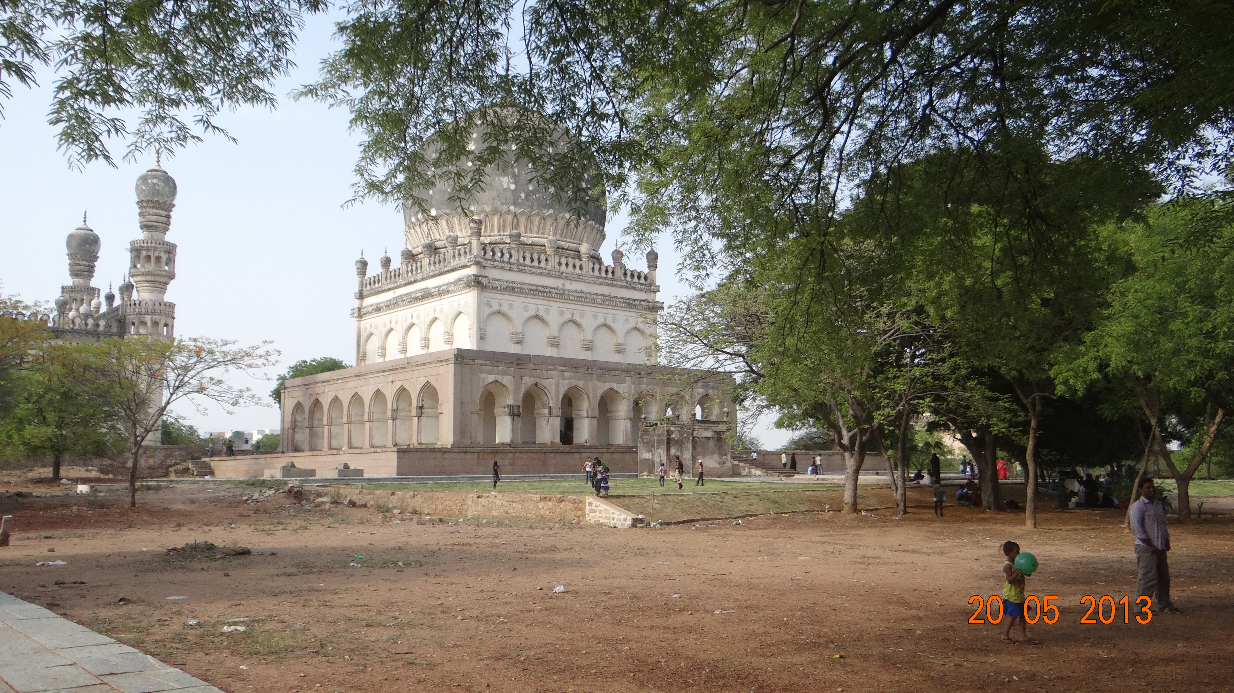 ഖുത്തുബ് ഷാഹി സ്മാരകല്‍ക്ക് ചുറ്റുമുള്ള ദൃശ്യം This media file is uploaded with Malayalam loves Wikimedia event - 3.